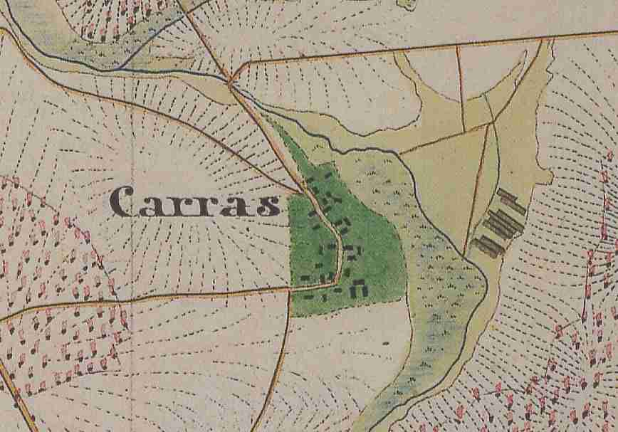 Ortsteil Karras, Stadt Friedland, Landkreis Oder-Spree, Brandenburg, Deutschland, Ausschnitt aus dem Urmesstischblatt 3951 Trebatsch von 1846